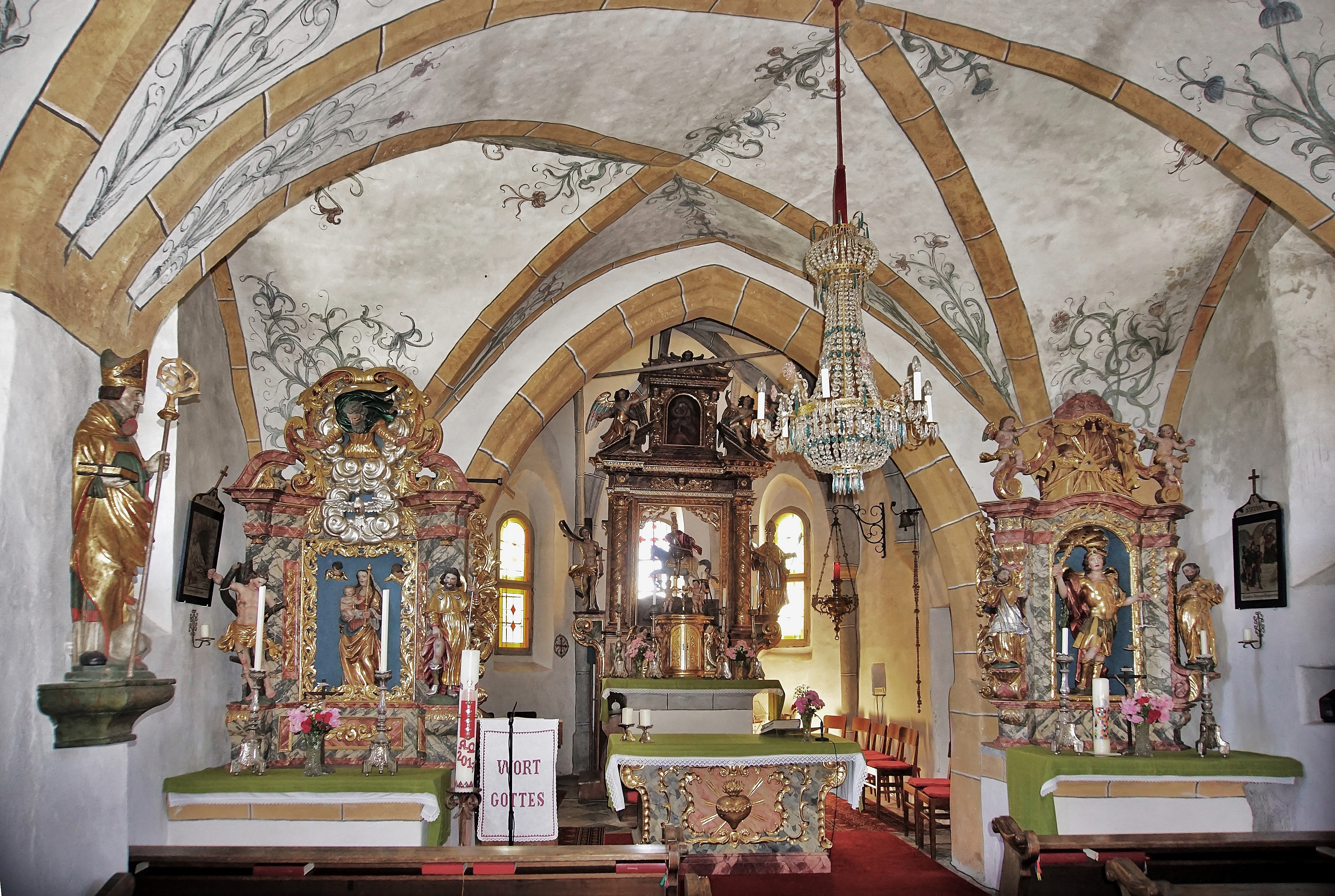 Kath. Filialkirche St. Martin (Feldkirchen in Kärnten), Innenansicht